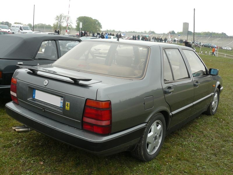 Français cadien: Montlhery Avril 2012